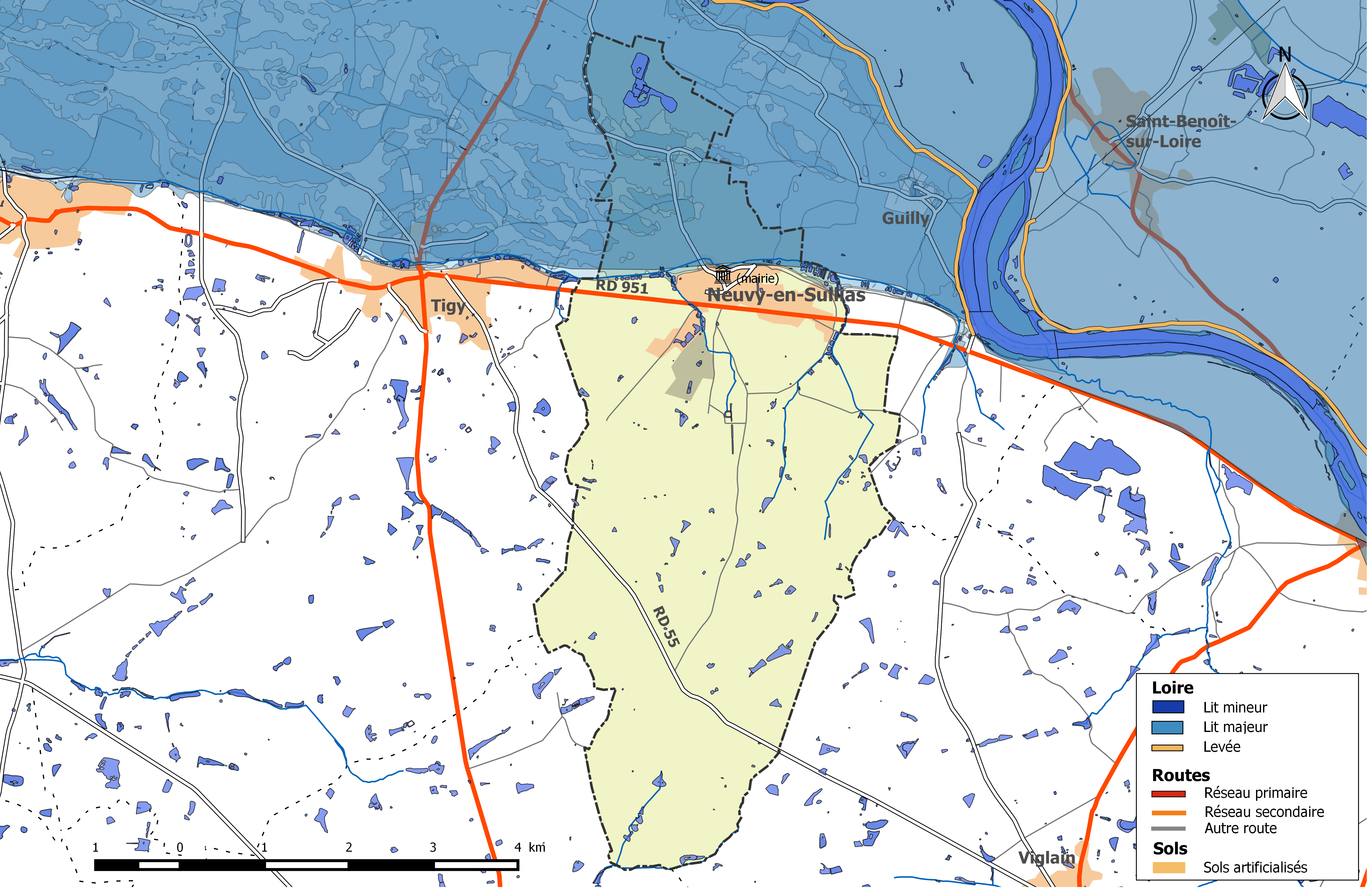 Zone inondable et réseaux hydrographique et routier de la commune de Neuvy-en-Sullias.